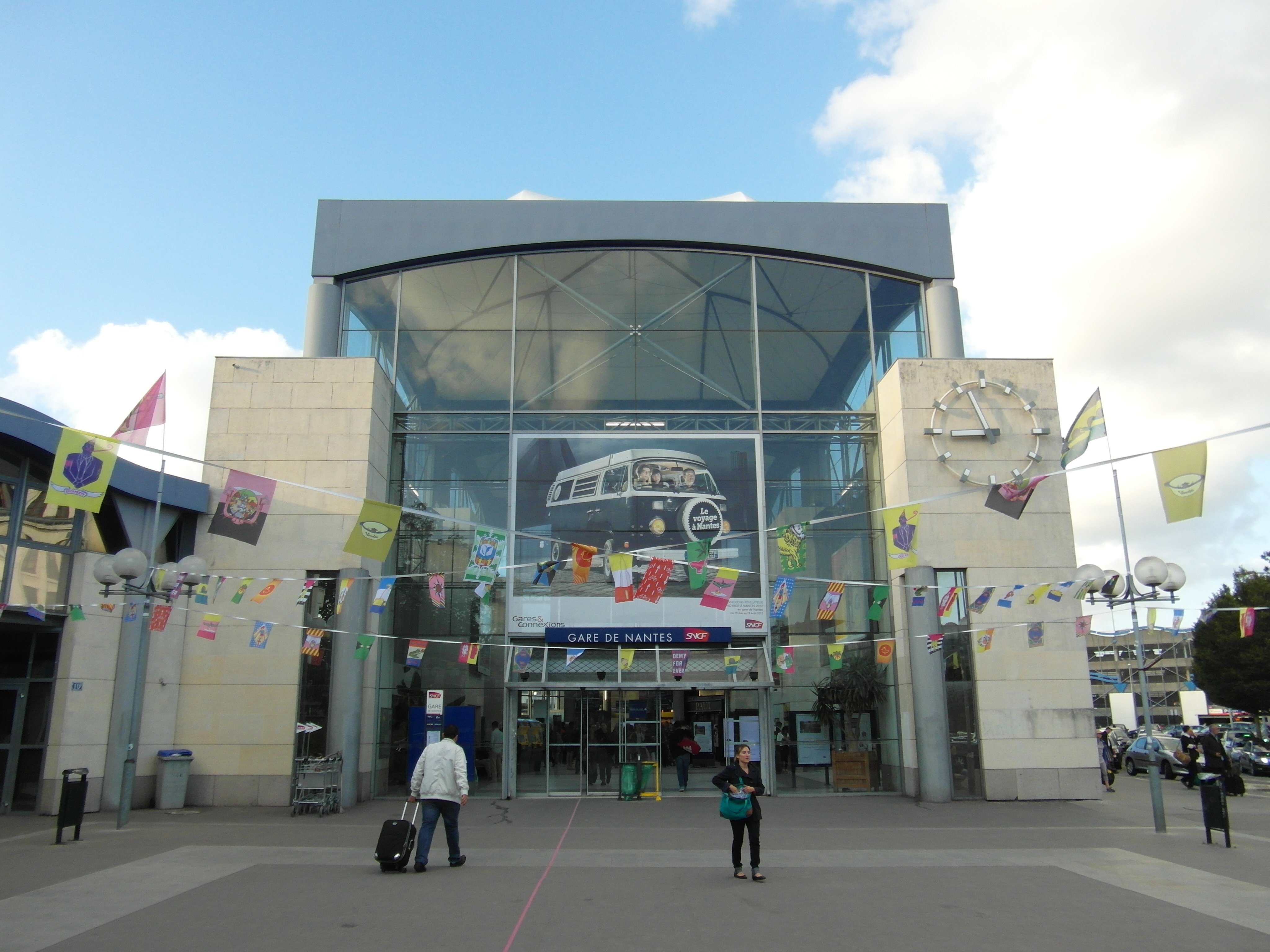 Nantes - Gare